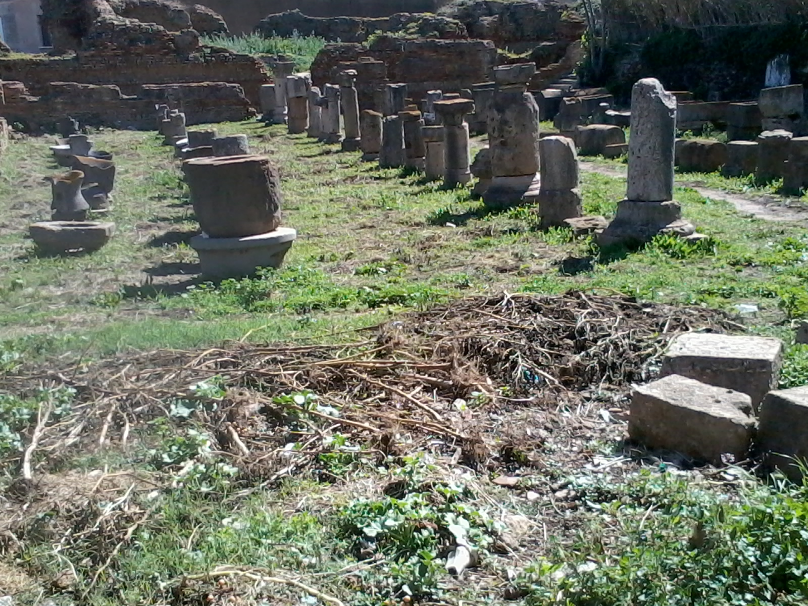 بقايا آثار رومانية